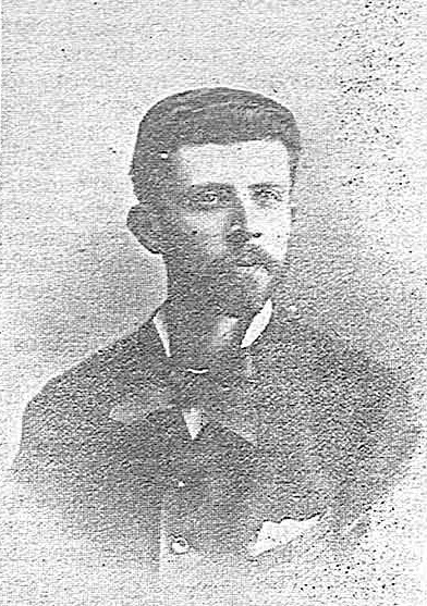 Muerto Ilustre. Don Rafael Torres Campos. Ilustre geográfo, escritor y académico, que ha fallecido en París. Fot. Alviach